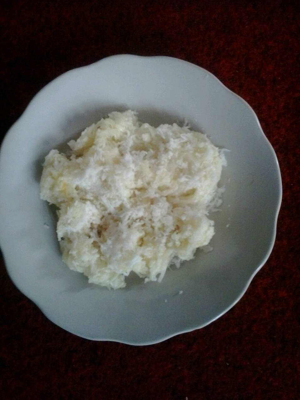 Kacimuih dengan taburan gula pasir